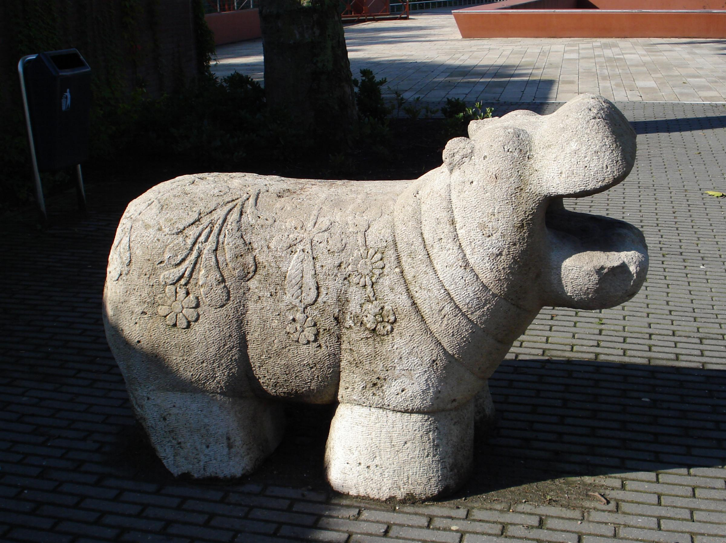 Rotterdam Afrikaanderplein. Kunstwerk "Nijlpaard" van Robbert Jan F. Donker. Rotterdam/The Netherlands.